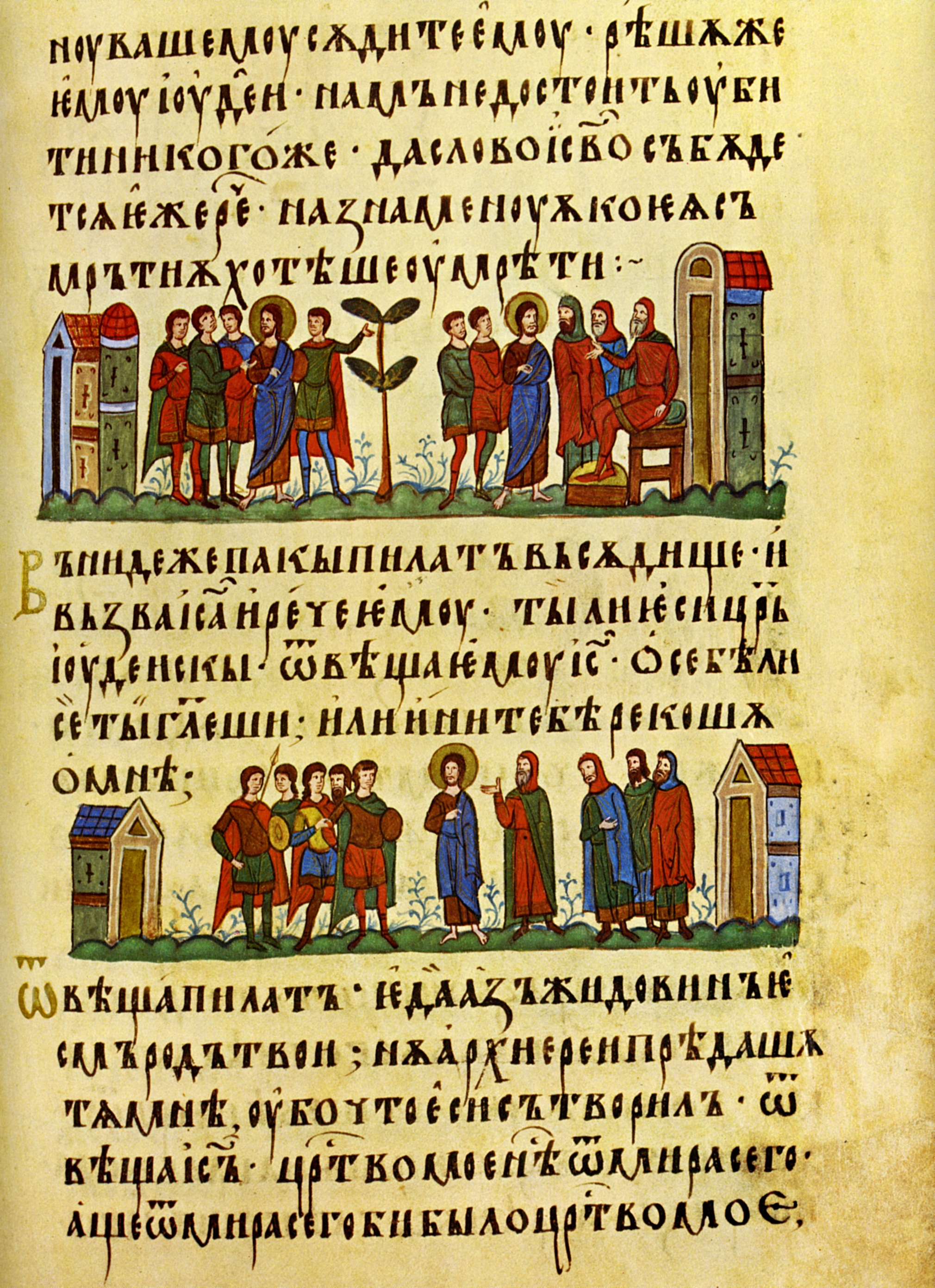 Четвероевангелие на цар Иван Александър, стр. 263 Миниатюри: Юдеите водят Исус при Пилат (горе) Пилат разпитва Исус (долу)